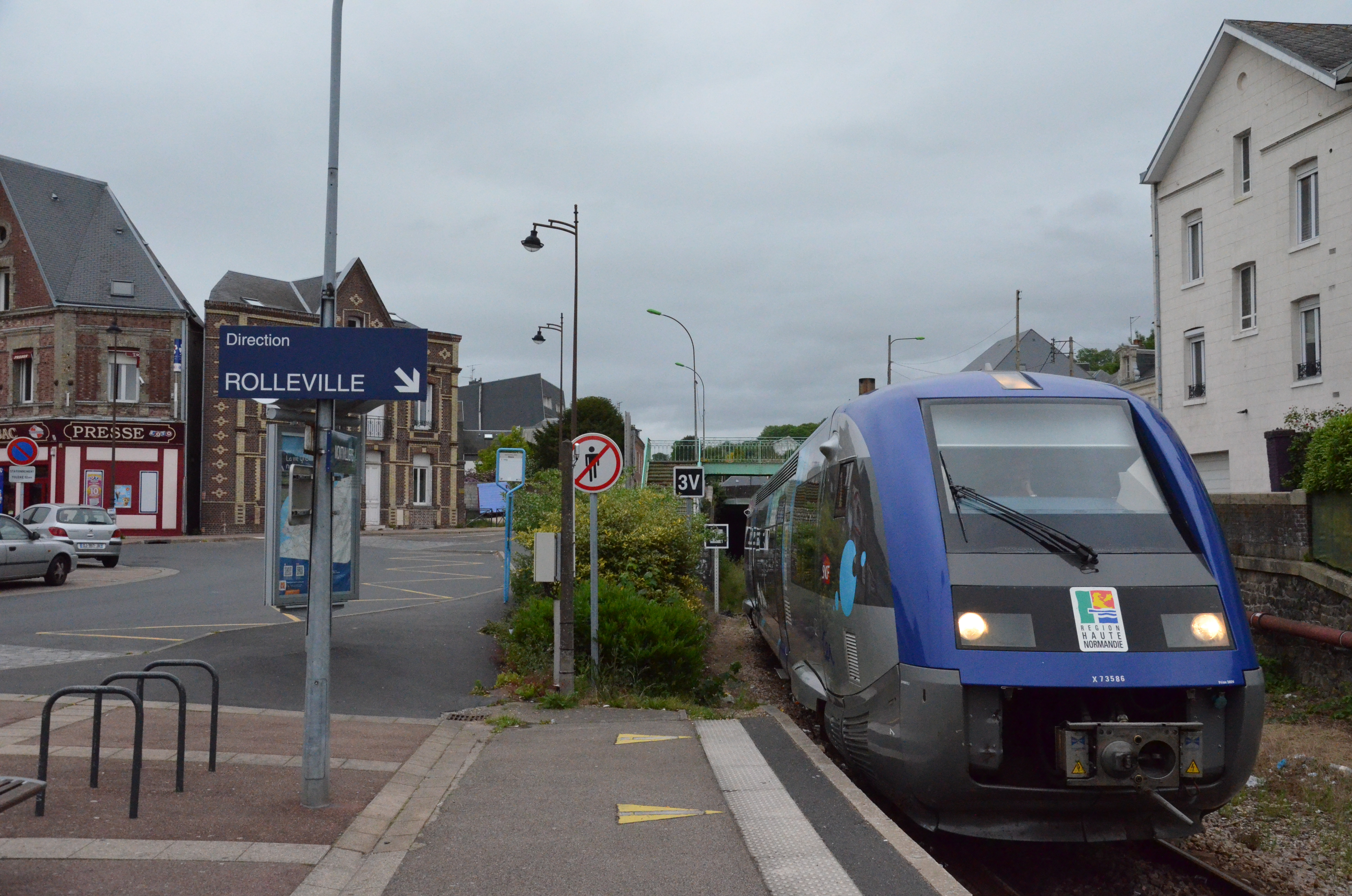 X73586 en gare de Montivilliers, en provenance de Rolleville et à destination du Havre (76).